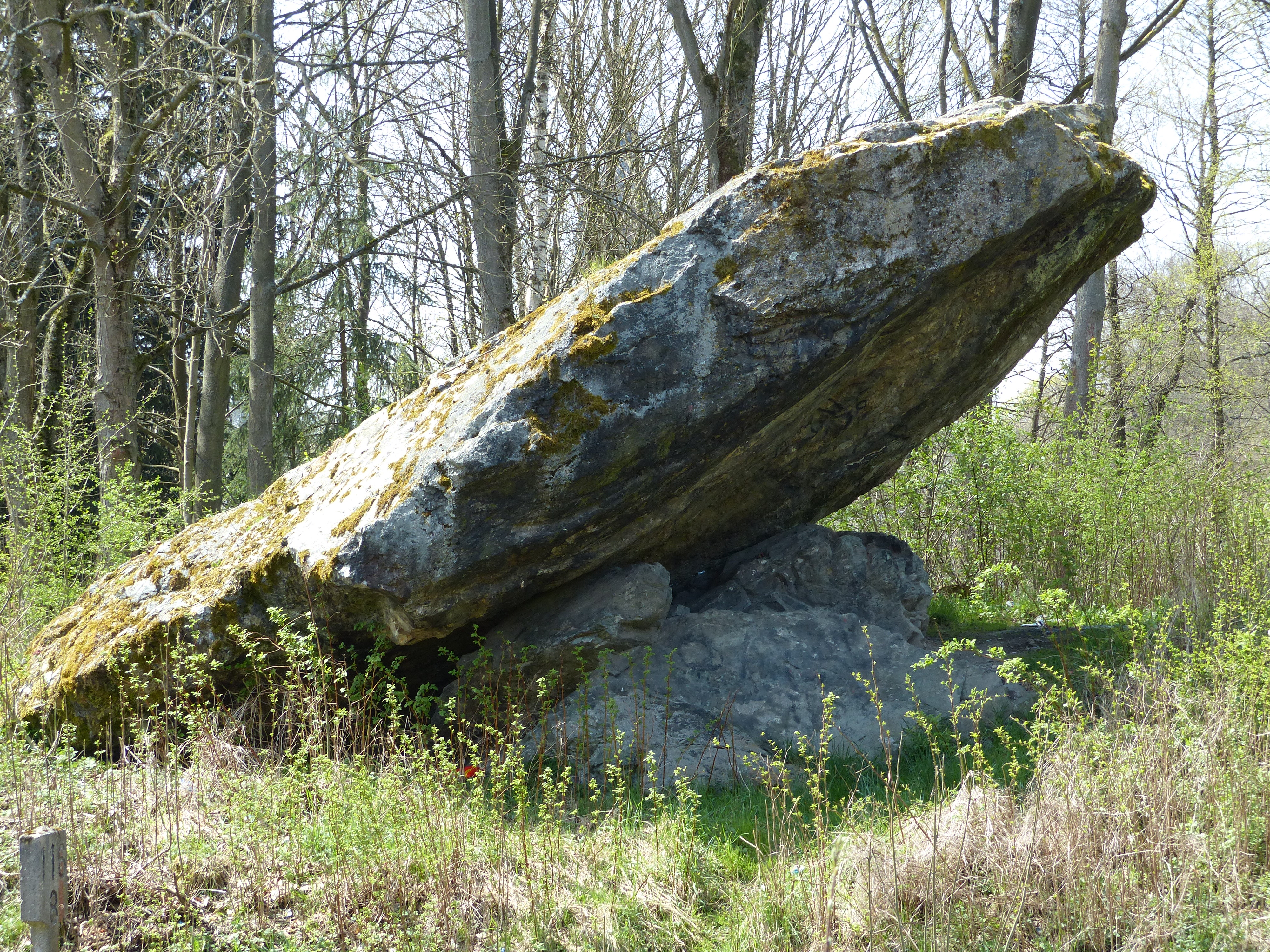 Geotop innerhalb der Stadt Schwarzenbach an der Saale